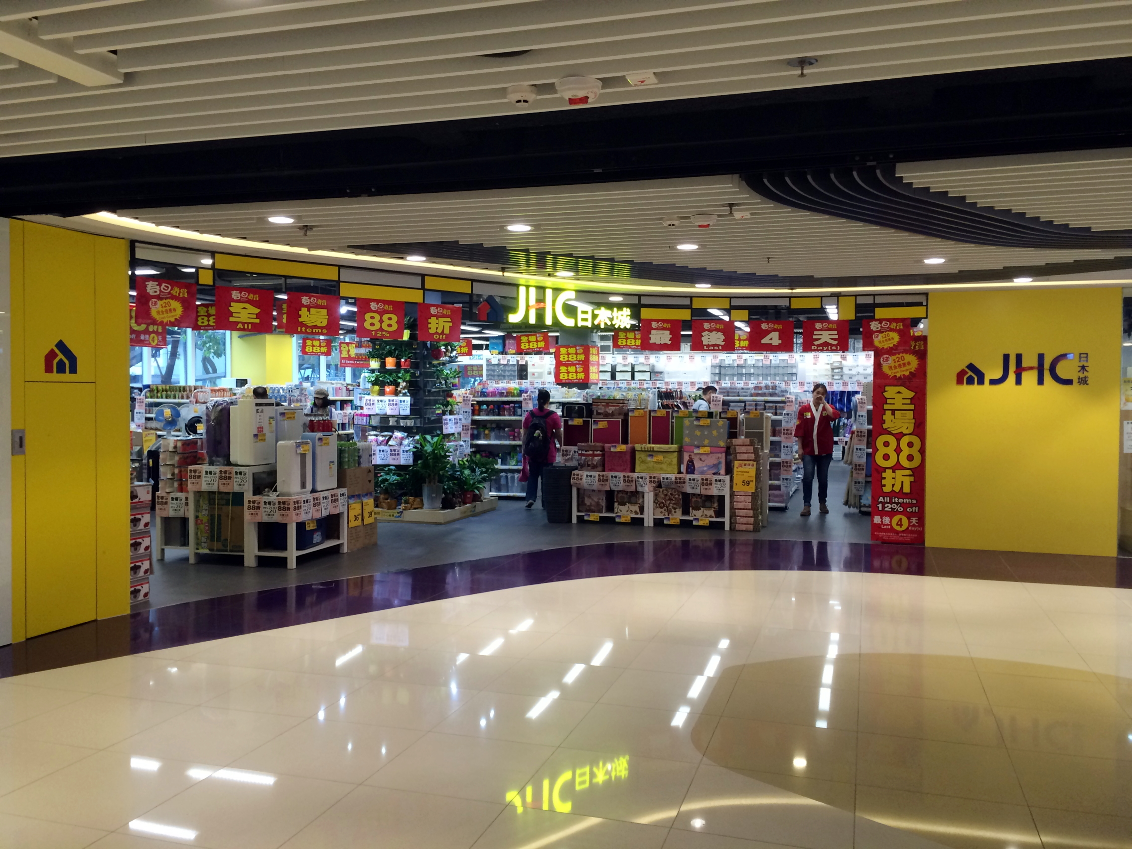 JHC Store in Tuen Mun H.A.N.D.S